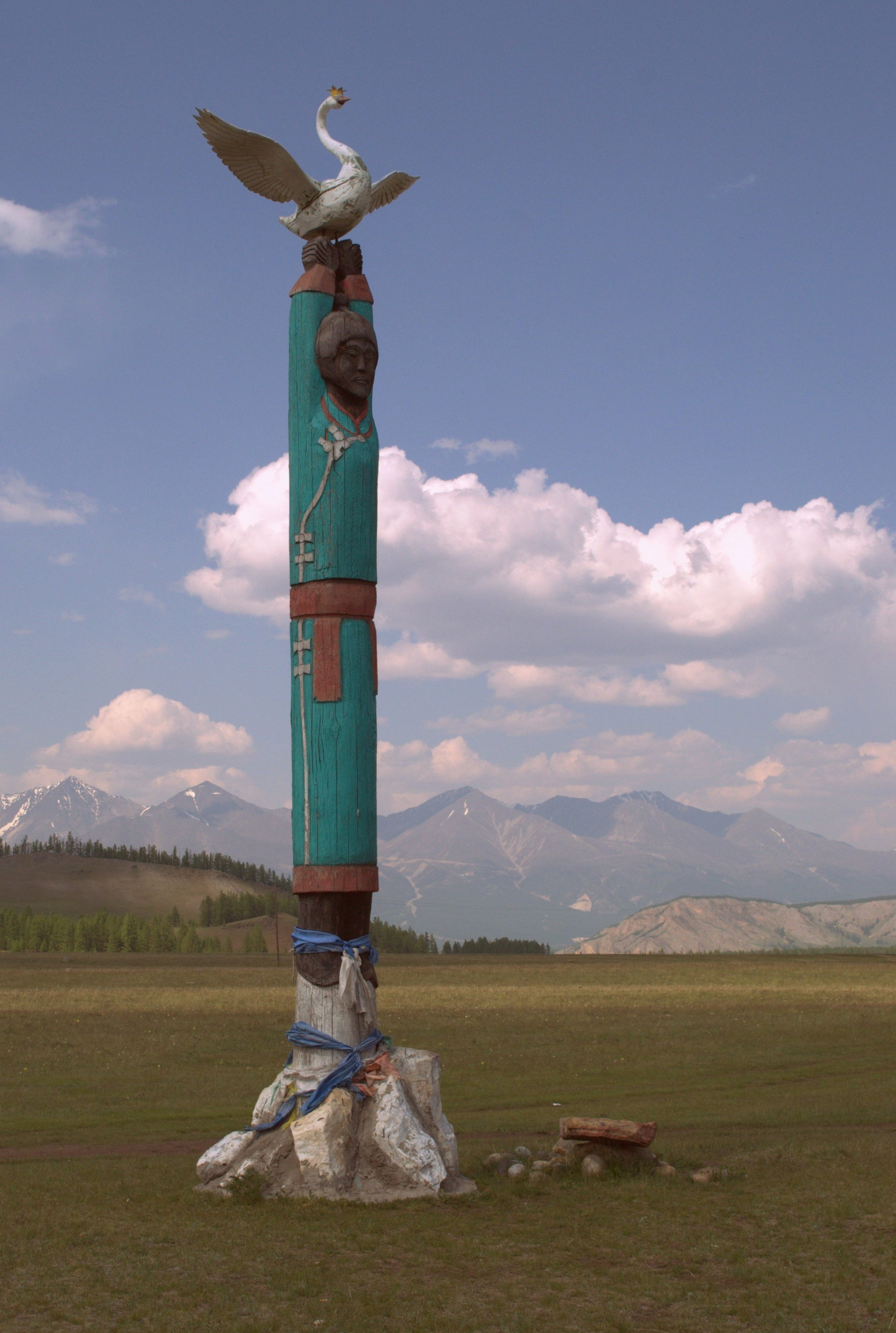 Стела хонгодоров в Окинском районе Бурятии